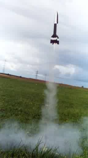 Ca. 45 Zentimeter langes Modell der A4 beim Start. Fotografiert: Juli 2000 Lizenzaussage: Ich habe dieses Bild im Juli 2000 selbst gemacht und gestatte die Verwertung in der Wikipedia!